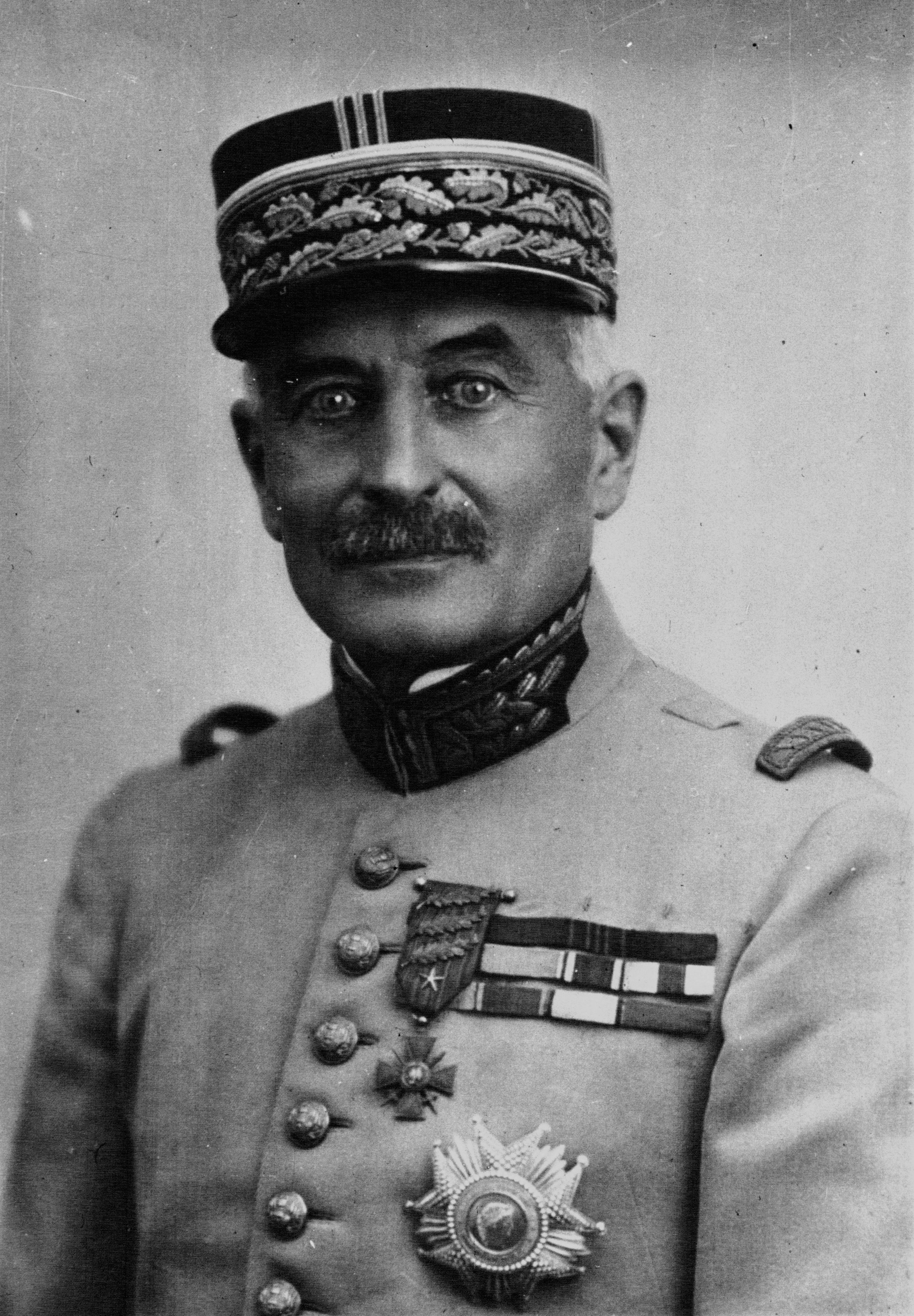 Général Brecard, gouverneur de Strasbourg : photographie de presse